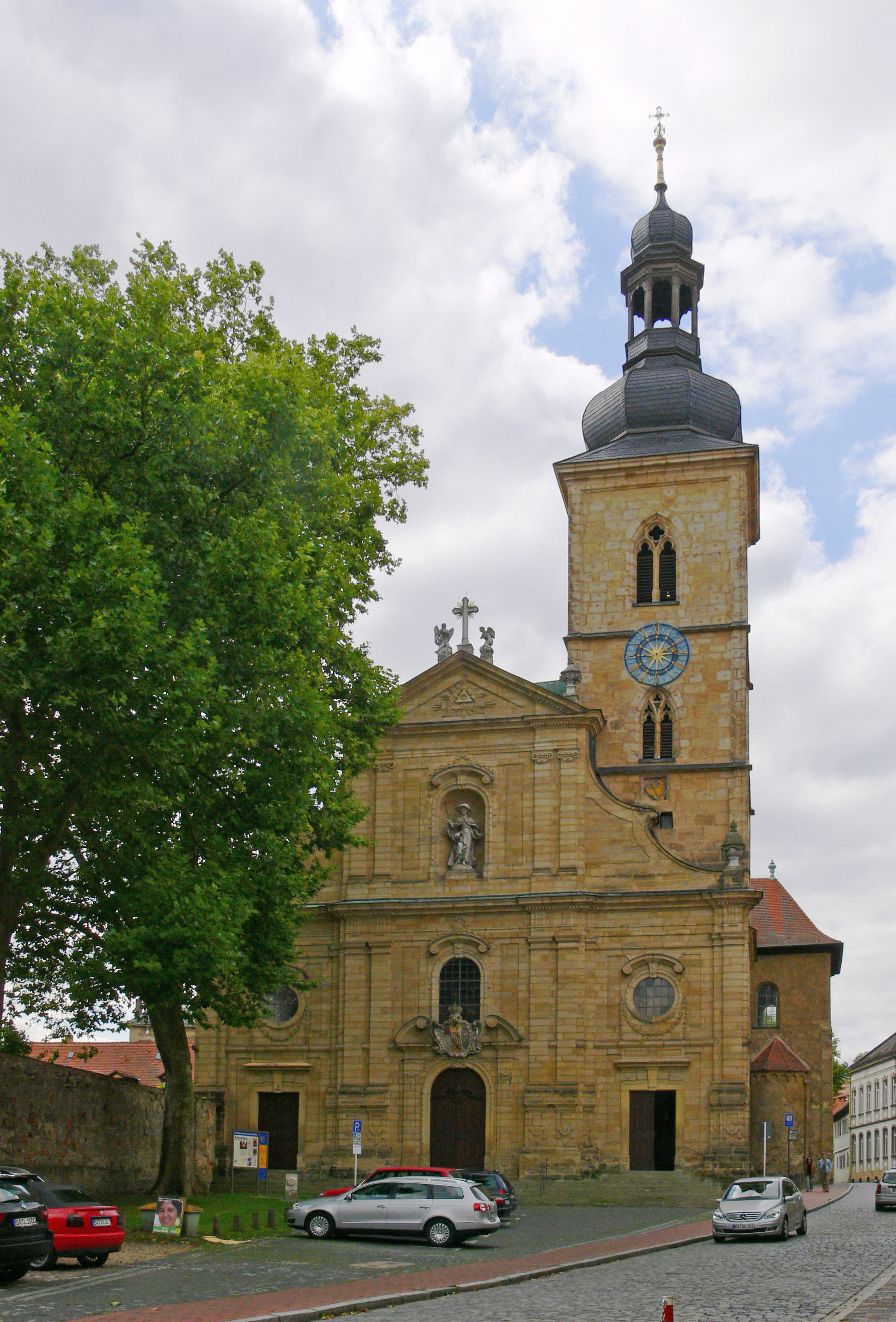 Bamberg, ehem. Stiftskirche St. Jakob Fassade